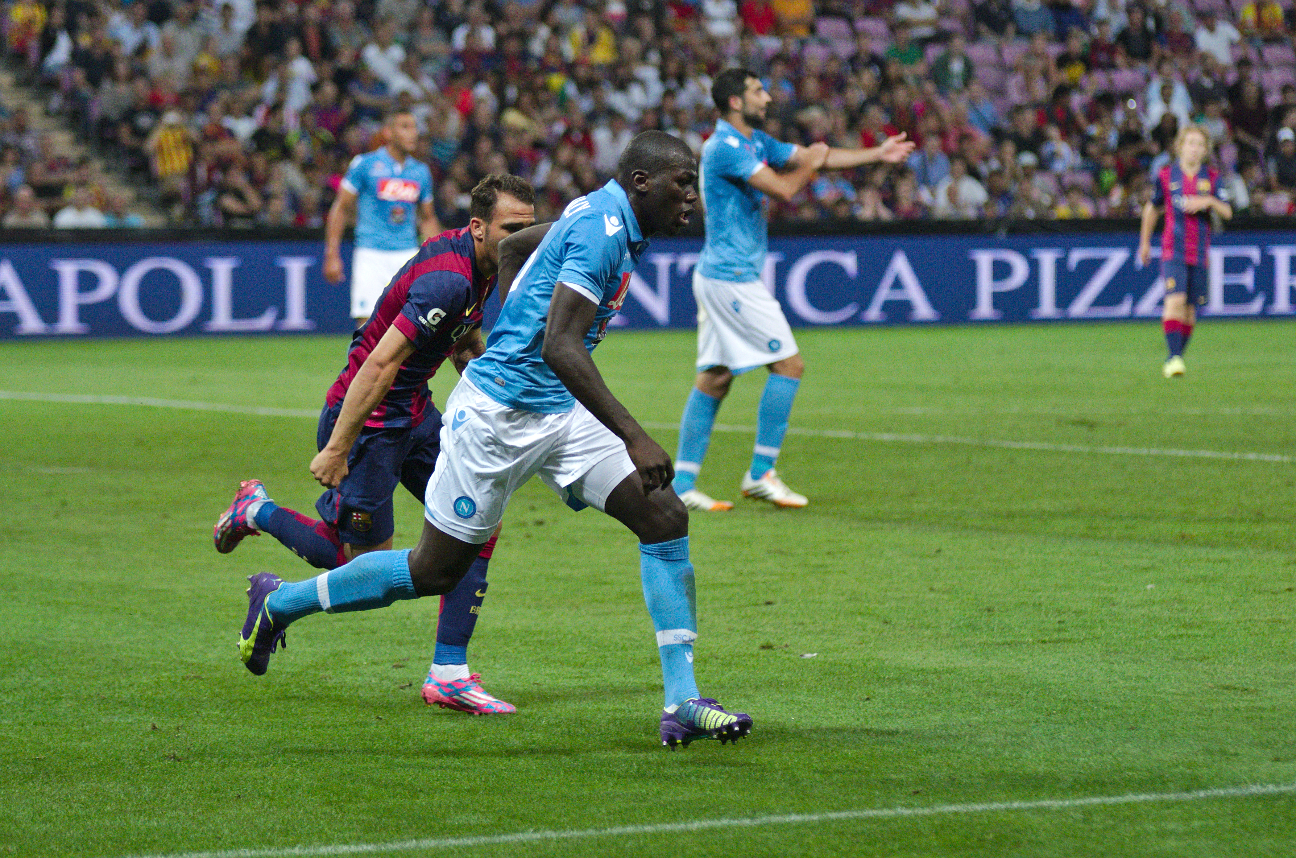 Barça - Napoli - 20140806